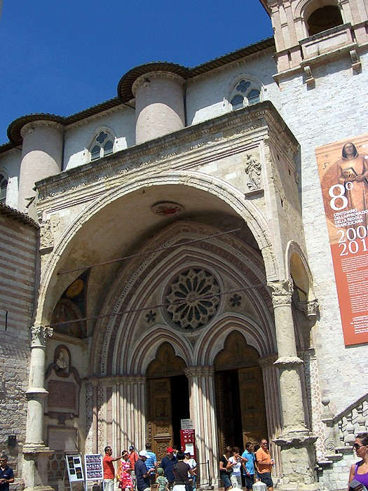 Assisi - Ingresso alla Basilica inferiore di S. Francesco